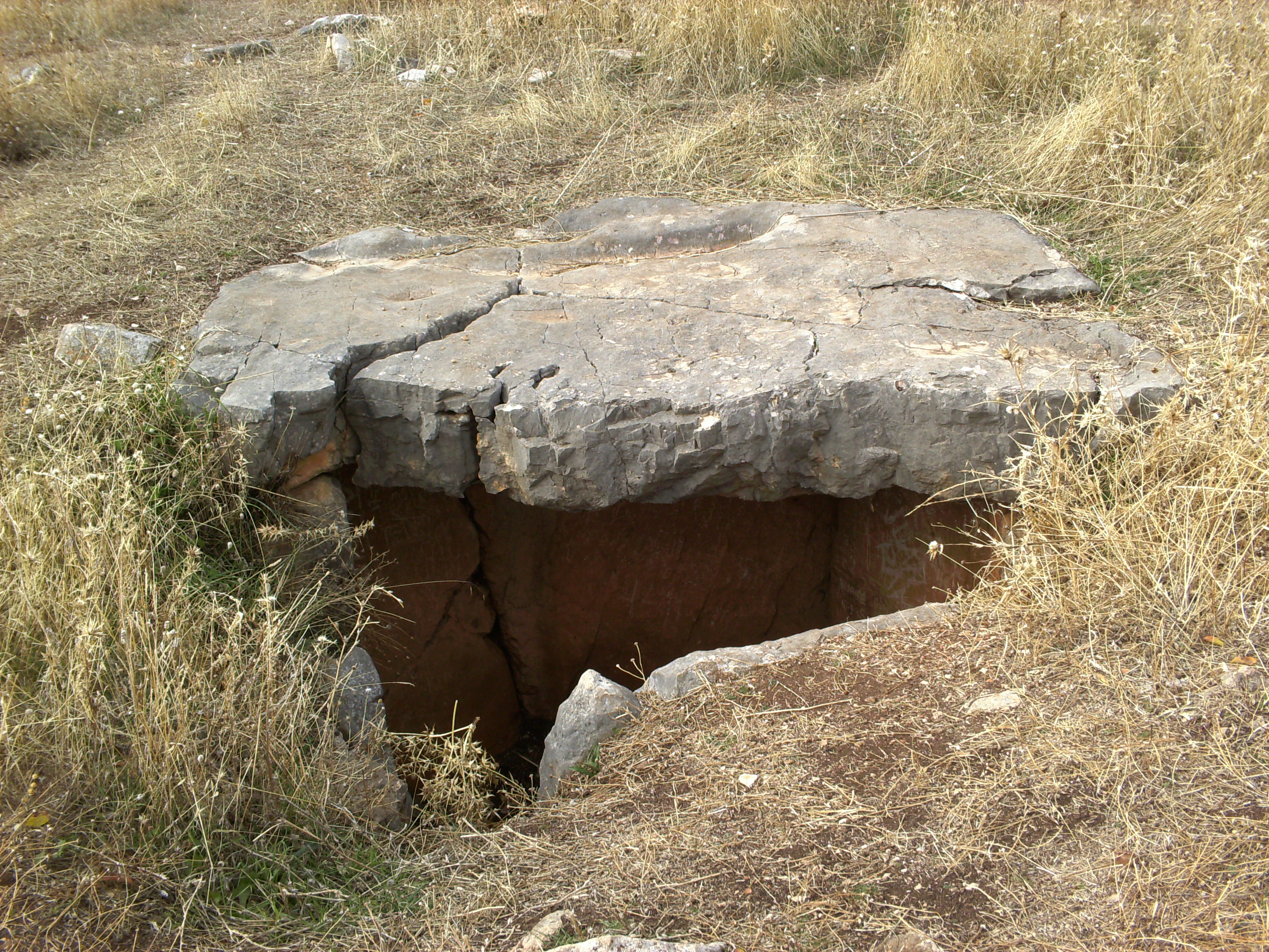 Dolmen del Cerro Veleta en la Zona Patrimonial de Otíñar (Jaén)